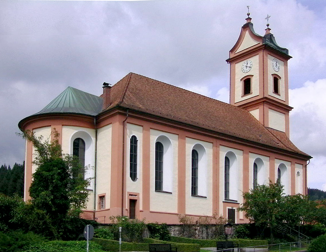 Oberwolfach/Bei der Kirche, Katholische Pfarrkirche St. Bartholomäus, Barockkirche von 1762